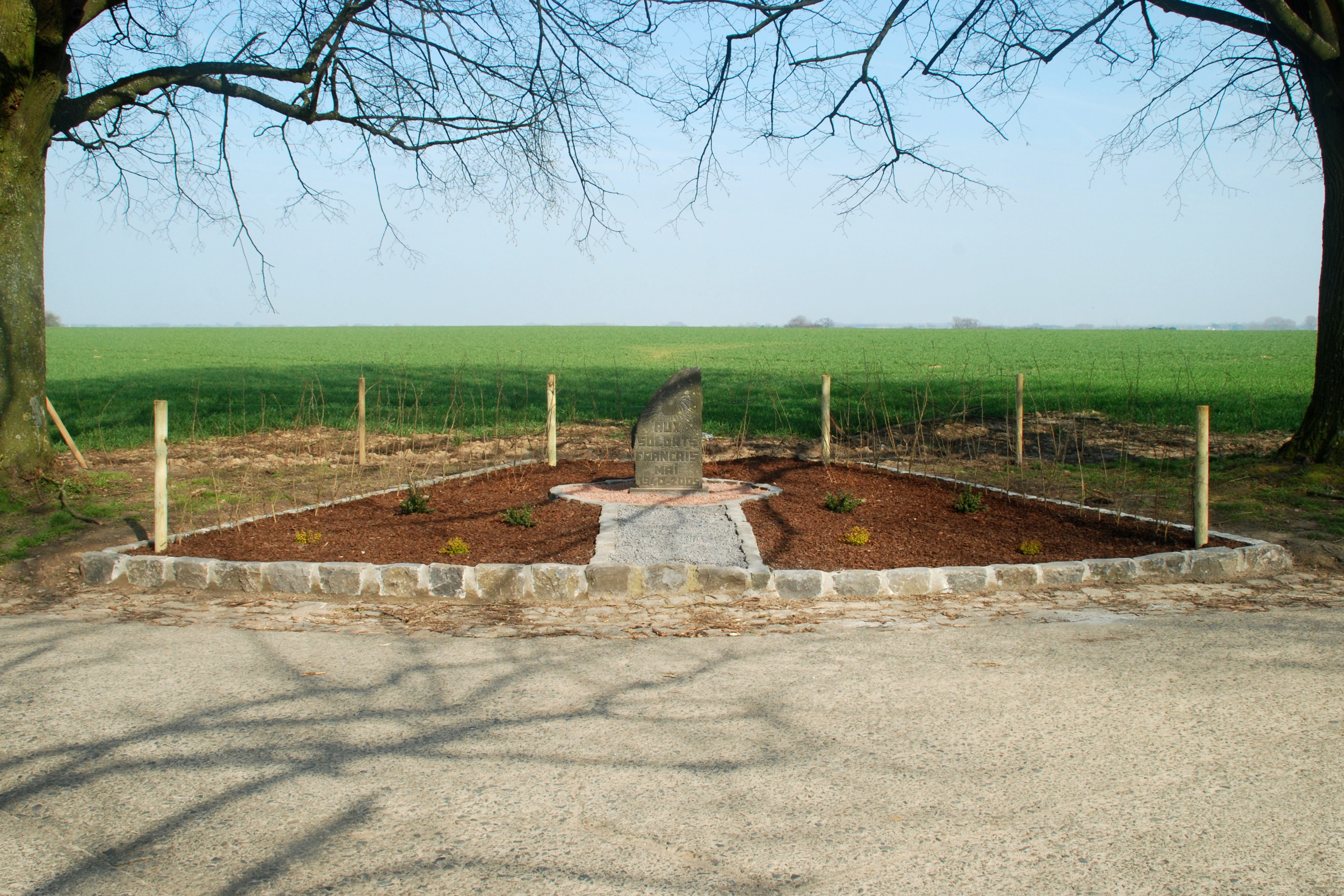 Belgique - Brabant wallon - Court-Saint-Étienne - Arbre de la justice